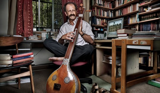 פרופסור ללימודי אפריקה ואסיה דוד שולמן